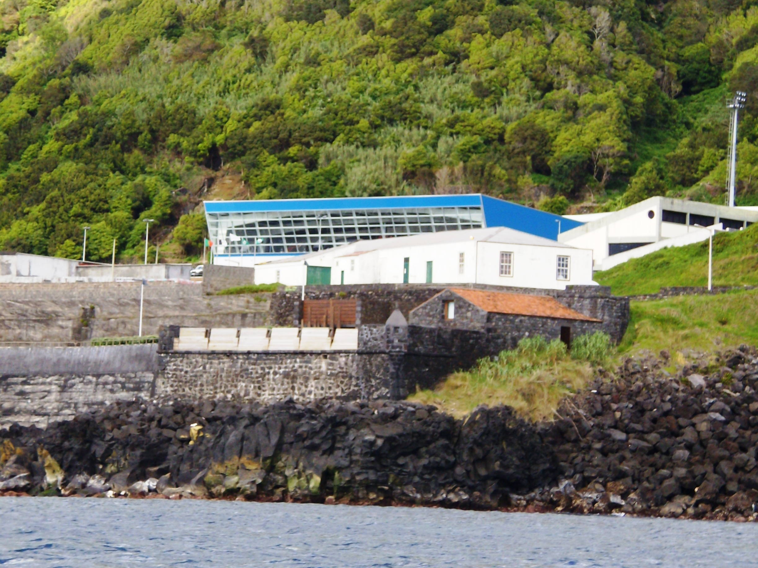 Forte de Santa Catarina, Lajes do Pico, ilha do Pico, Açores. Ao fundo, o Lajes Shopping.